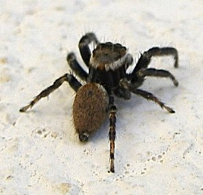 jumping spider, Evarcha jucunda.